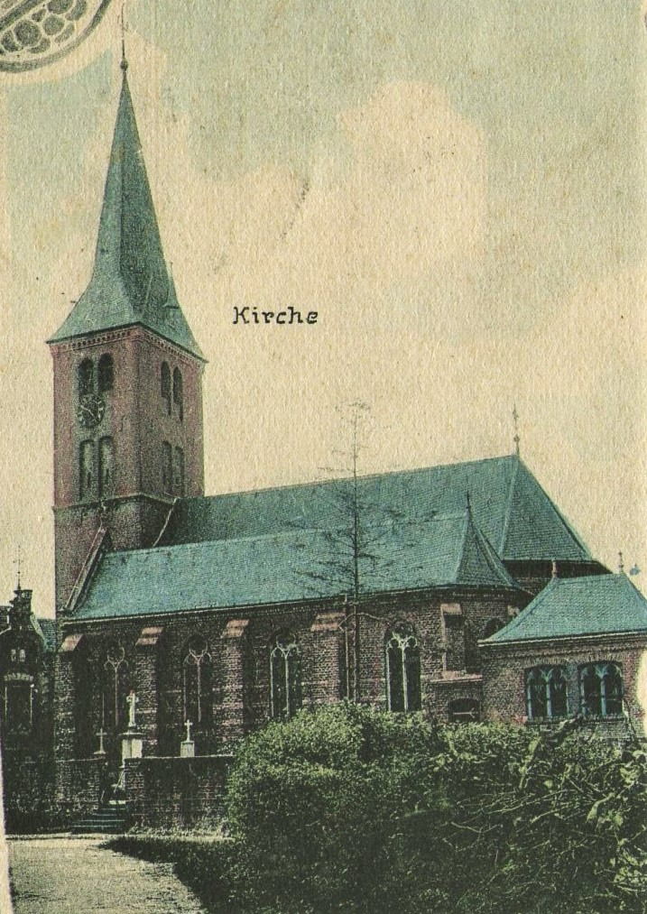 vor 1908